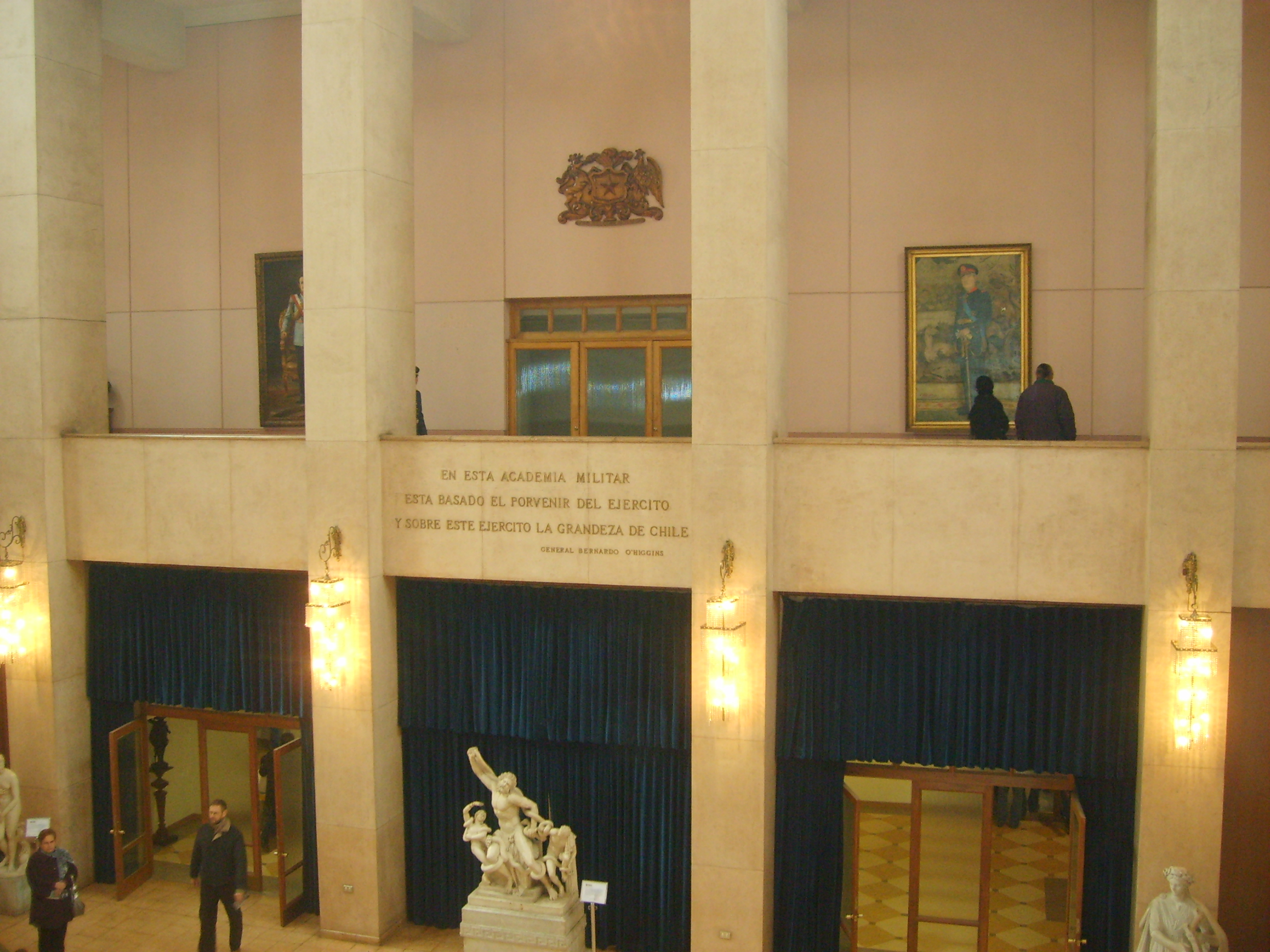 Fotografía del Hall central de la Escuela Militar